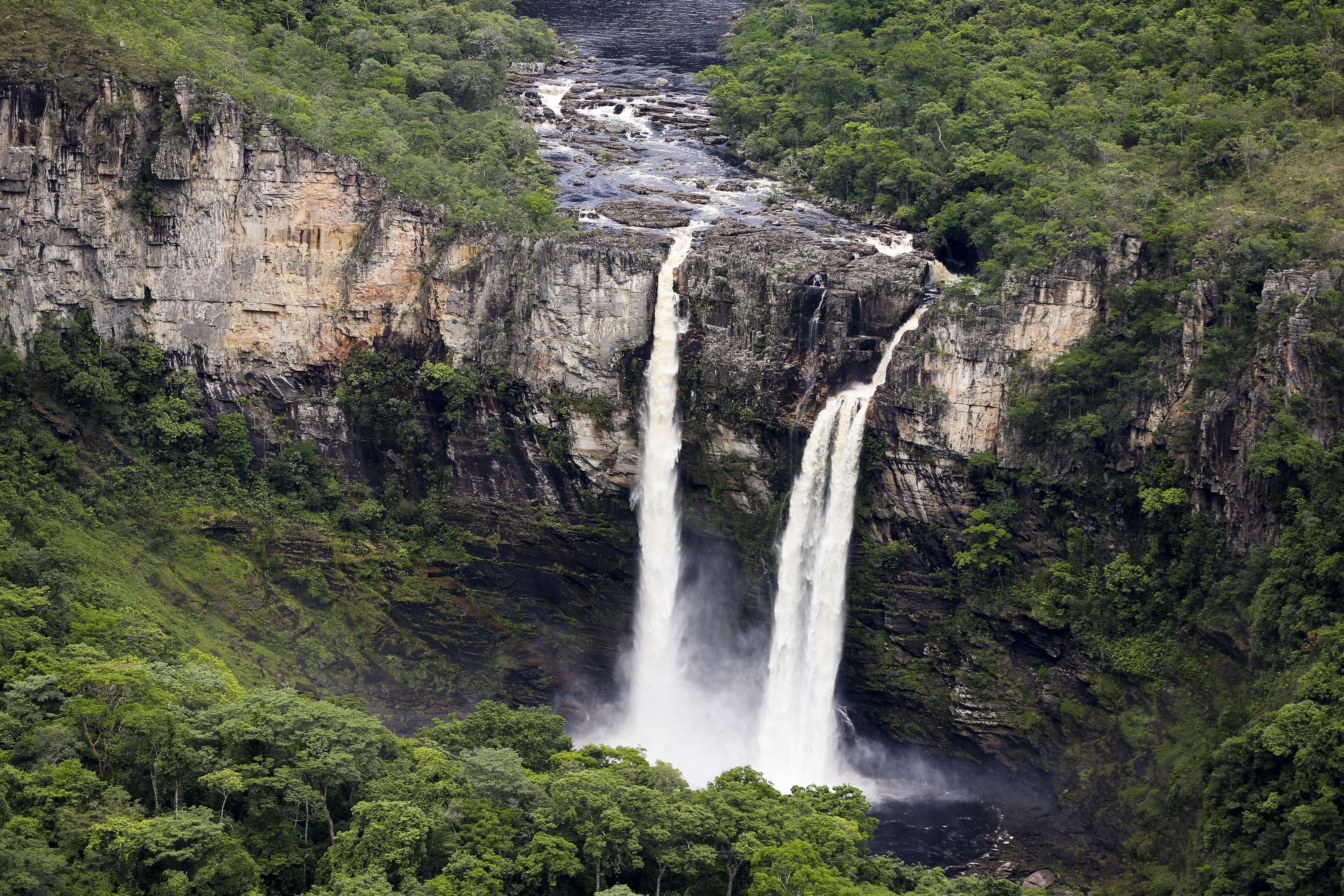 Alto Paraíso (GO) - Vista dos Saltos do Rio Preto, a partir do Mirante da Janela, área que faz parte da proposta de ampliação do Parque Nacional da Chapada dos Veadeiros.